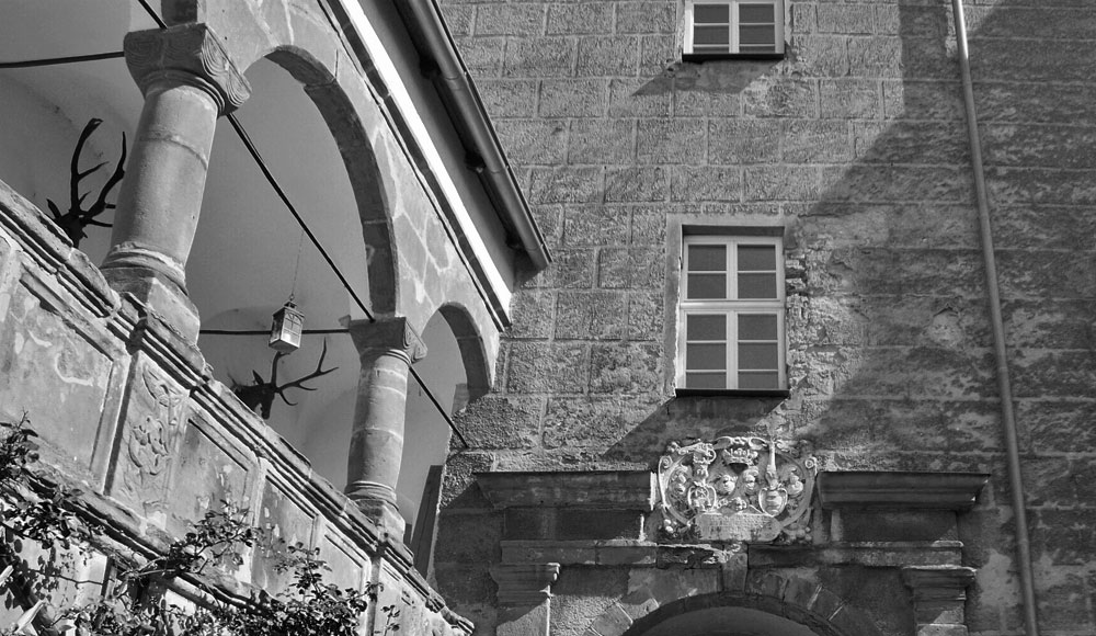 Detail im Innenhof von Schloss Fronberg: Links ein Teil der Arkaden.